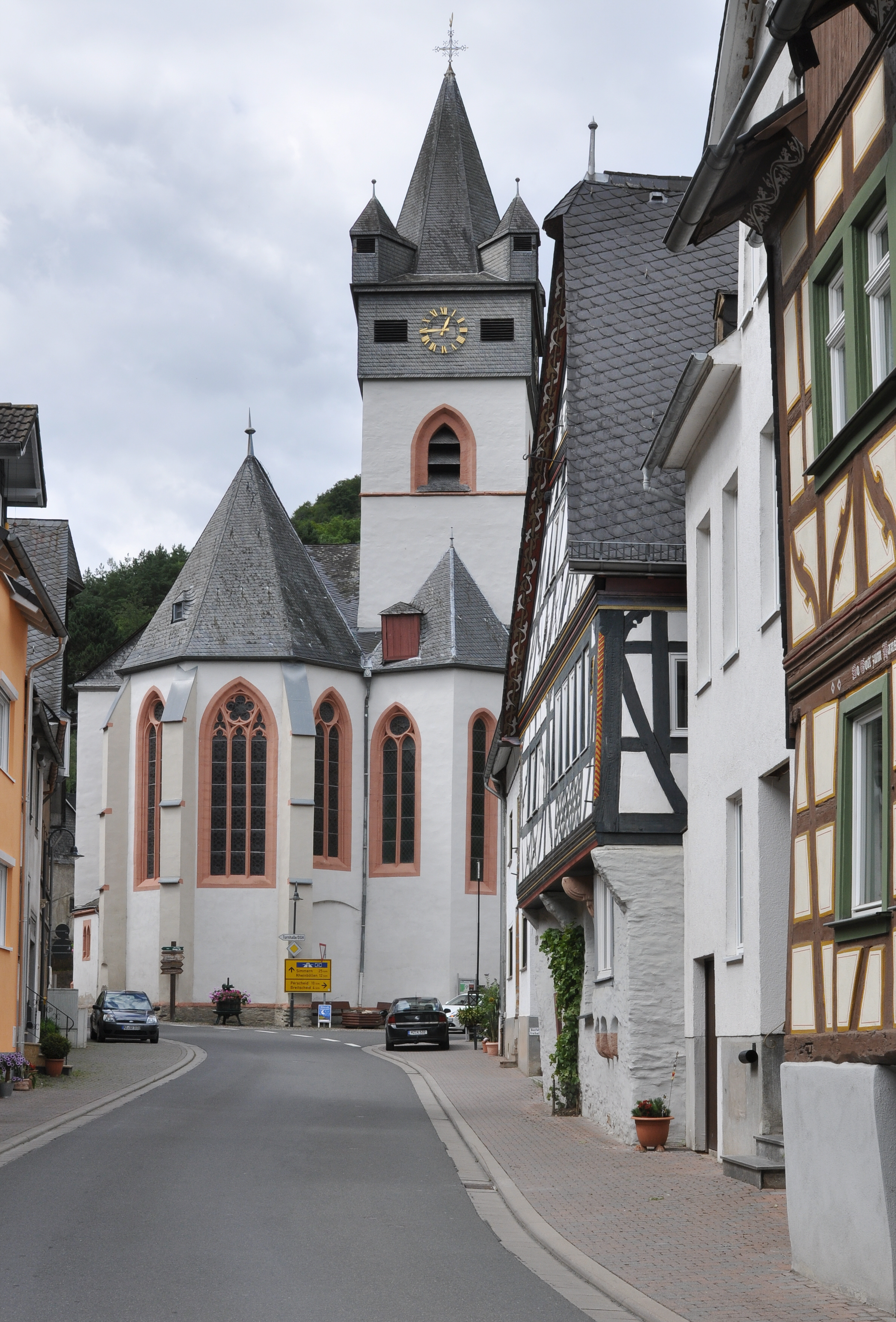 Ansicht von Osten